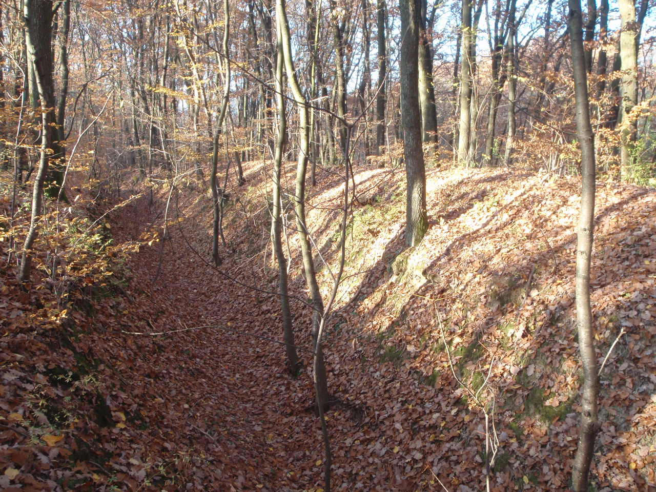 Zsidó munkaszolgálatosok által ásott lövészárok Kőszeg, Alsó-erdőben, Horvátzsidányi úttal párhuzamosan. 1944-45-ben épült